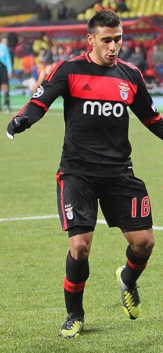 Disputa de bola entre um jogador do Benfica e um jogador do Spartak de Moscovo